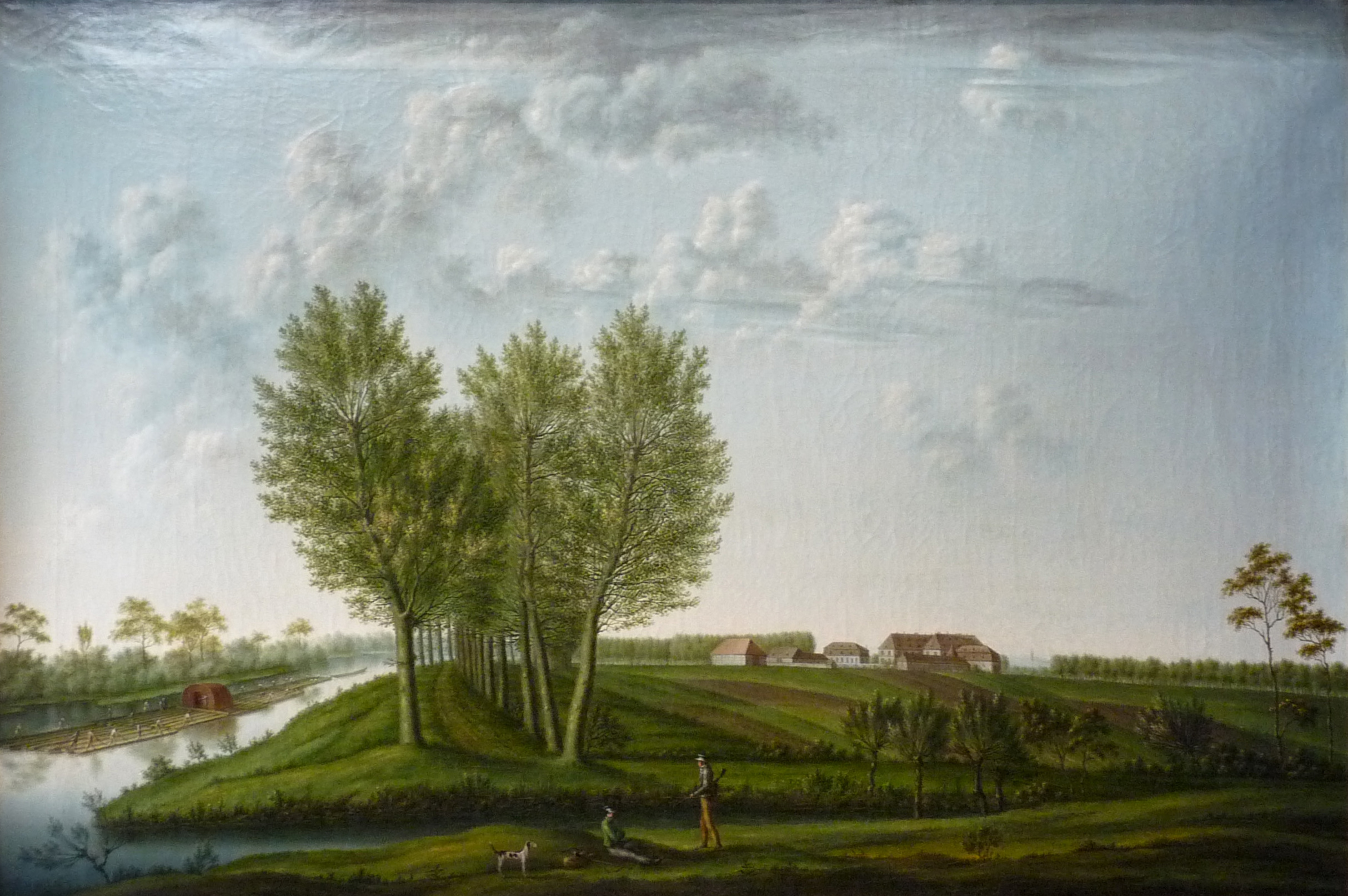 Vue du Jardin d'Angleterre (créé par Robert Koenigsmann). Vers 1800-1810 (Musée historique de Strasbourg)